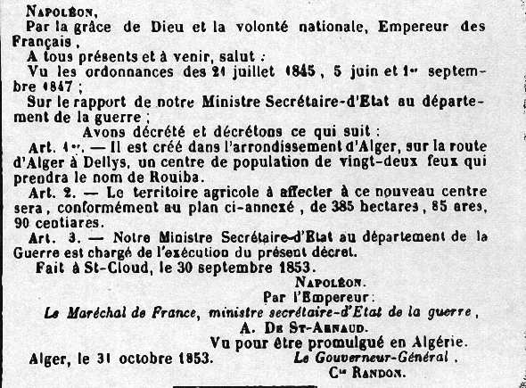 Décret de création de la commune de Rouïba